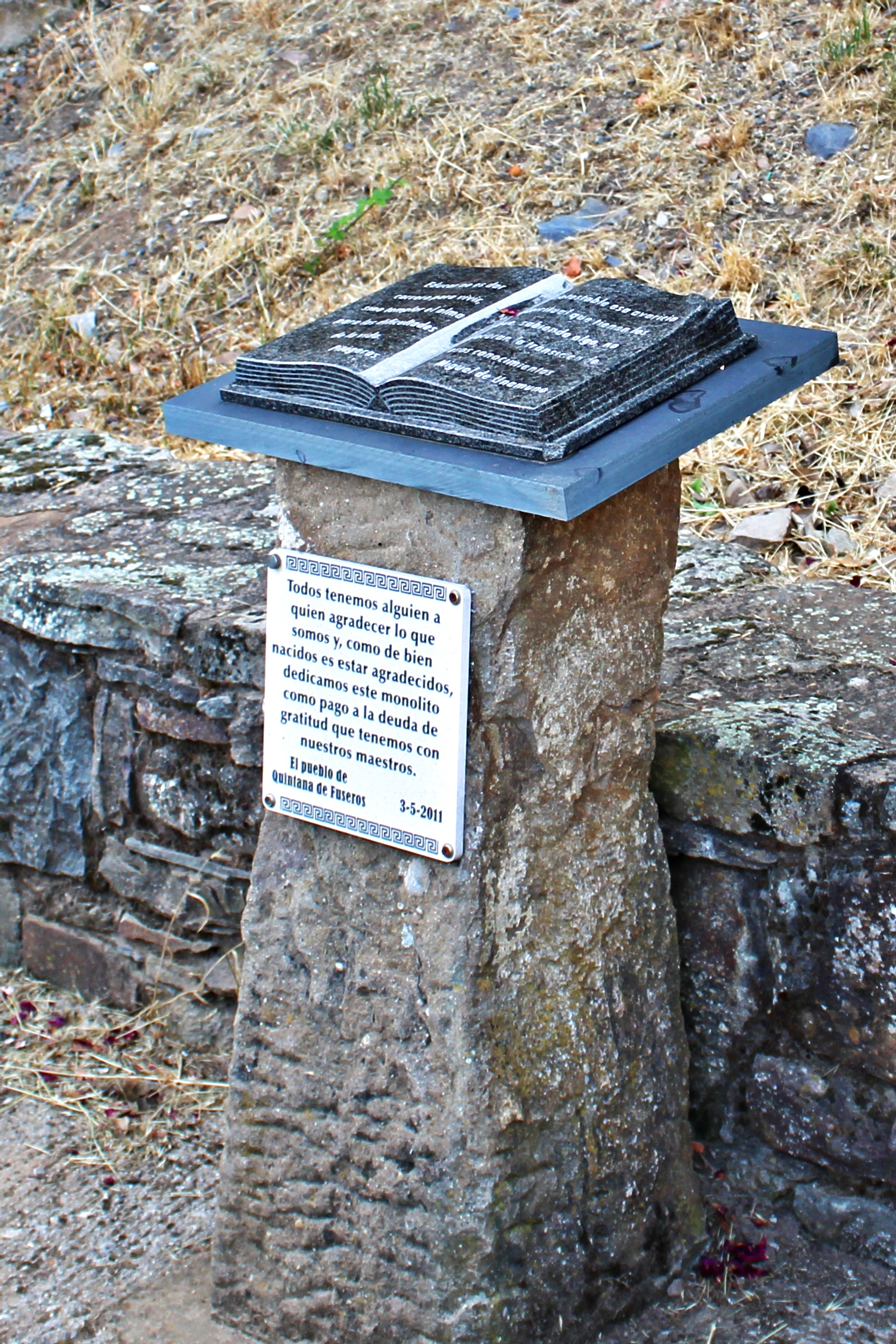 Quintana de Fuseros, municipio de Igüeña, comarca de El Bierzo, provincia de León.